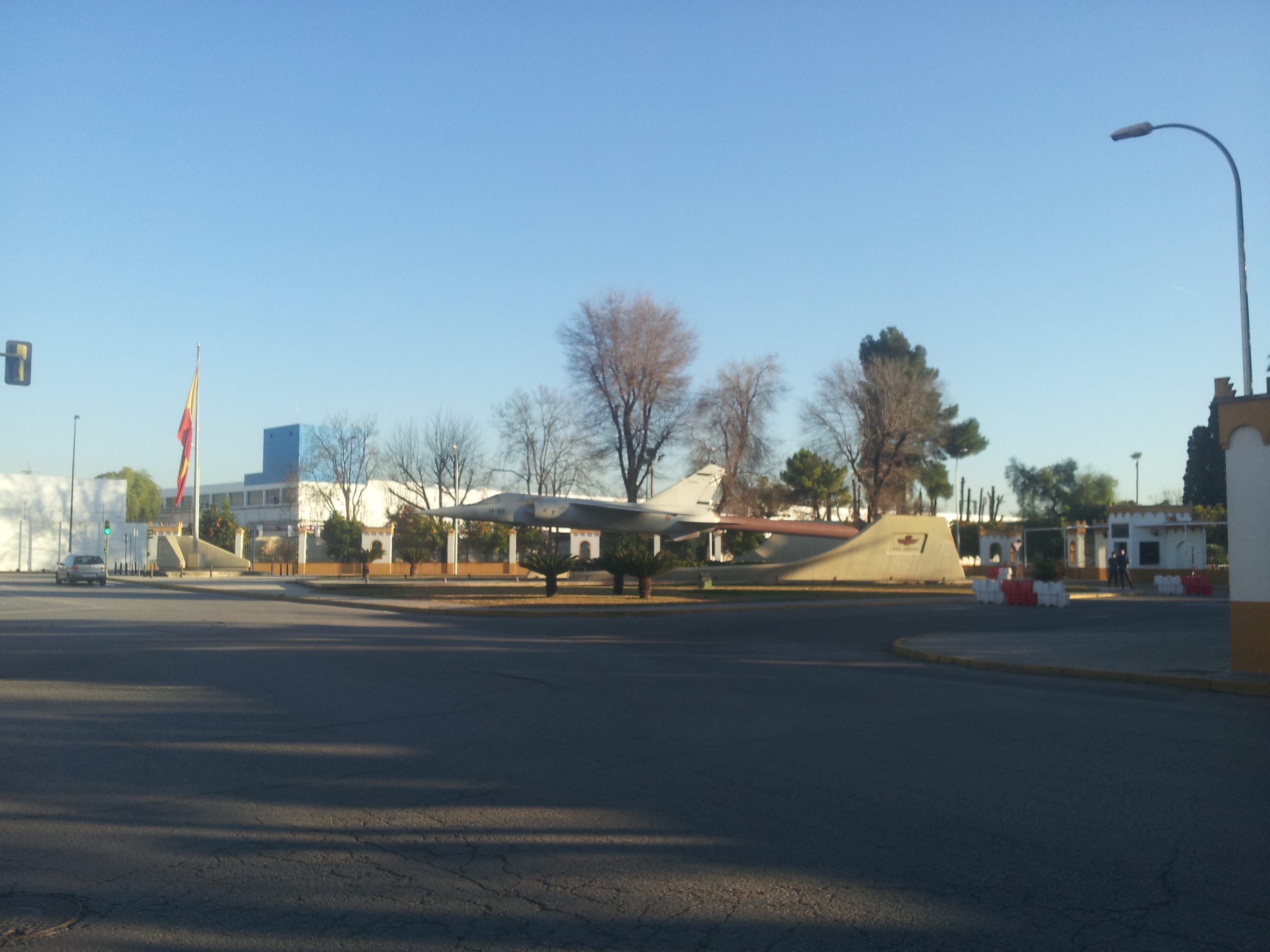 Mirage F-1 en la entrada de la base aérea de Tablada